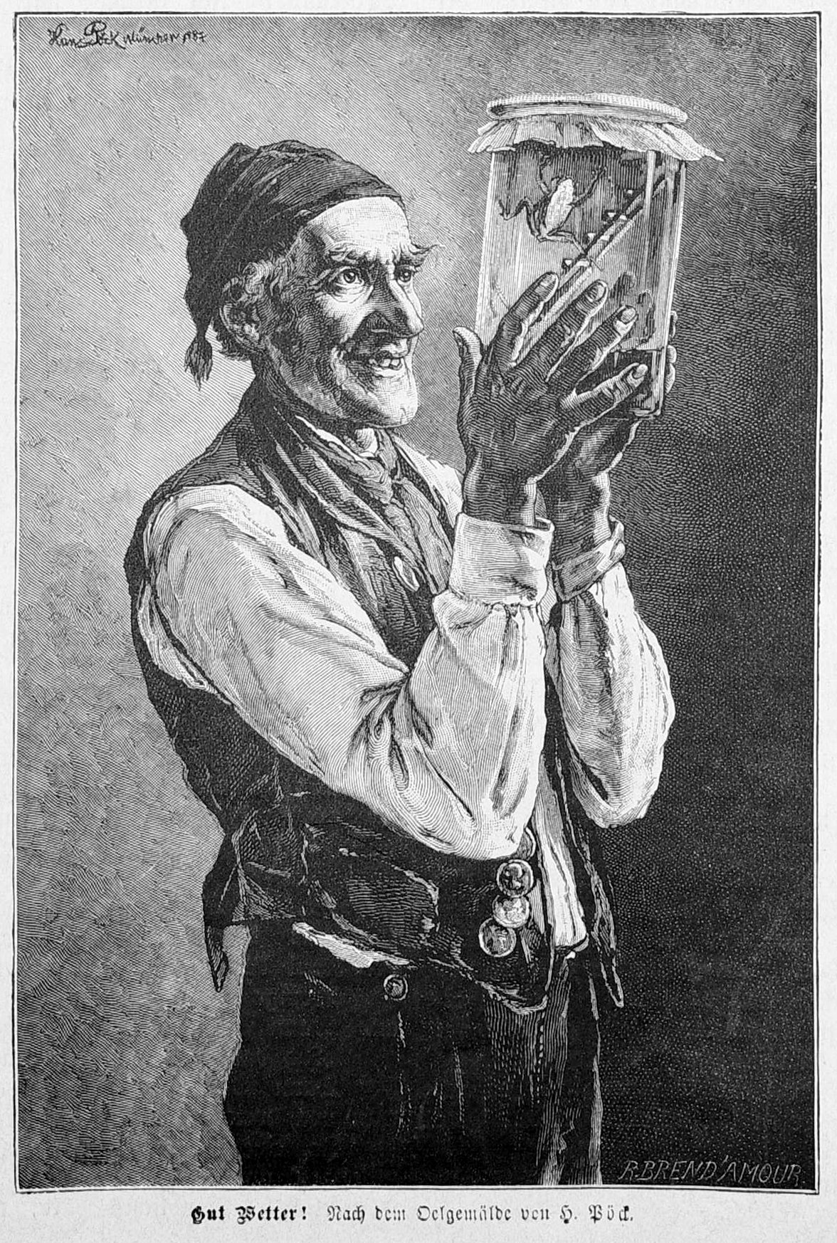 Bild aus Seite 385 in "Die Gartenlaube". Image from page 385 of journal Die Gartenlaube, 1887.